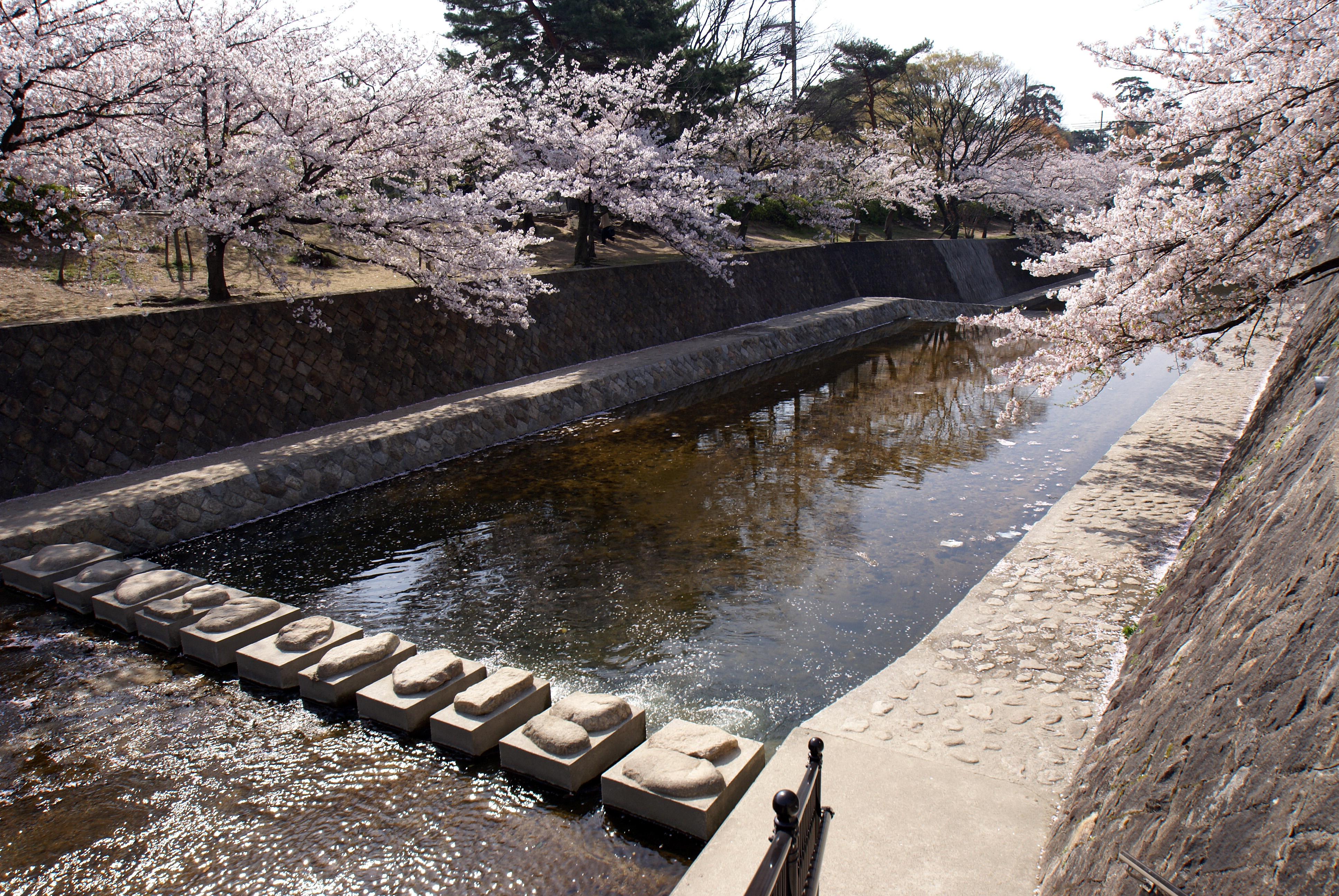 Shukugawa in Nishinomiya, Hyogo prefecture, Japan